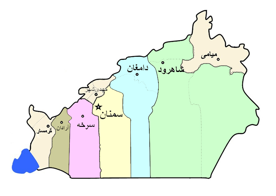 موقعیت شهرستان سرخه در استان سمنان